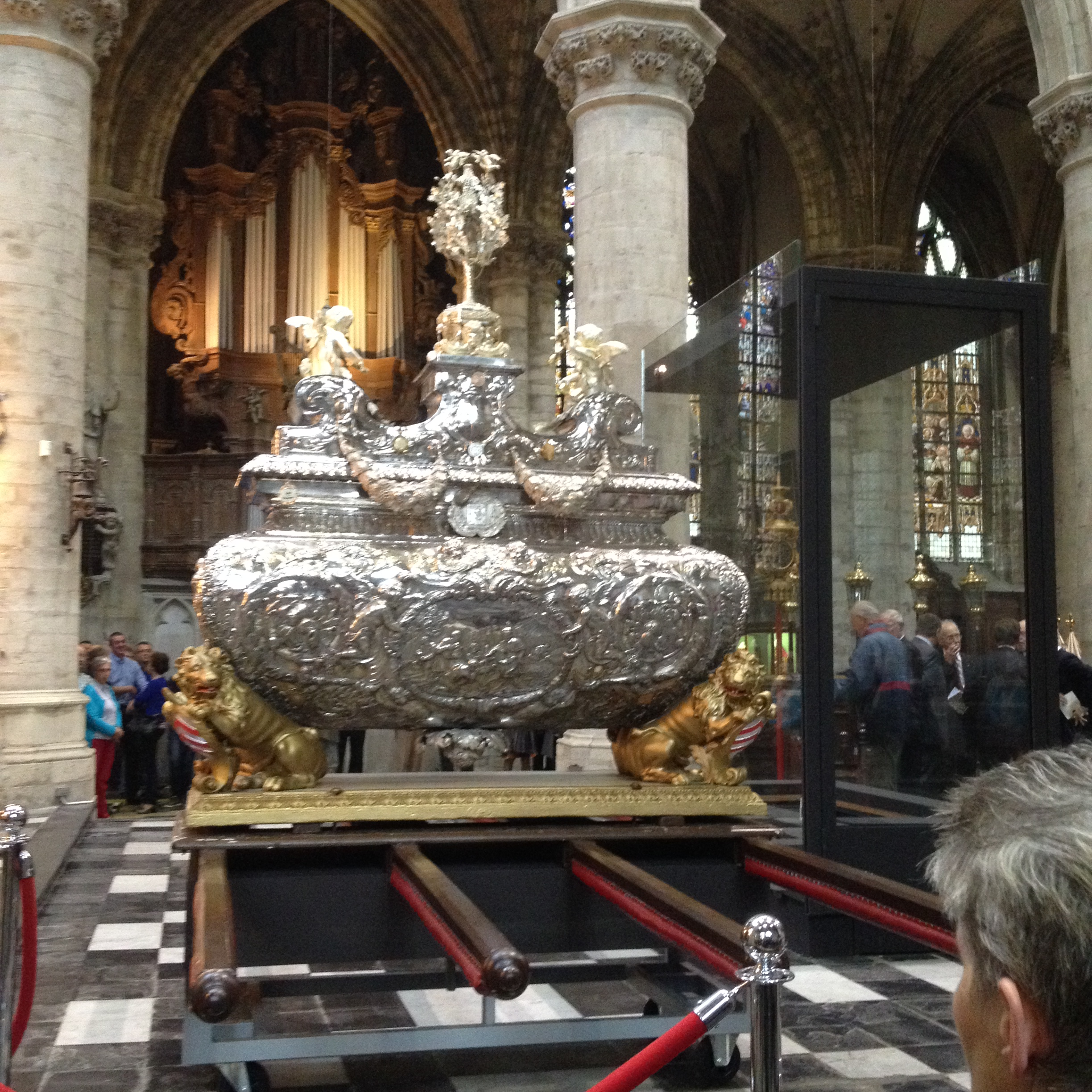 Shrine of Saint-Gummarus (Church of Sint-Gummarus, Lier)